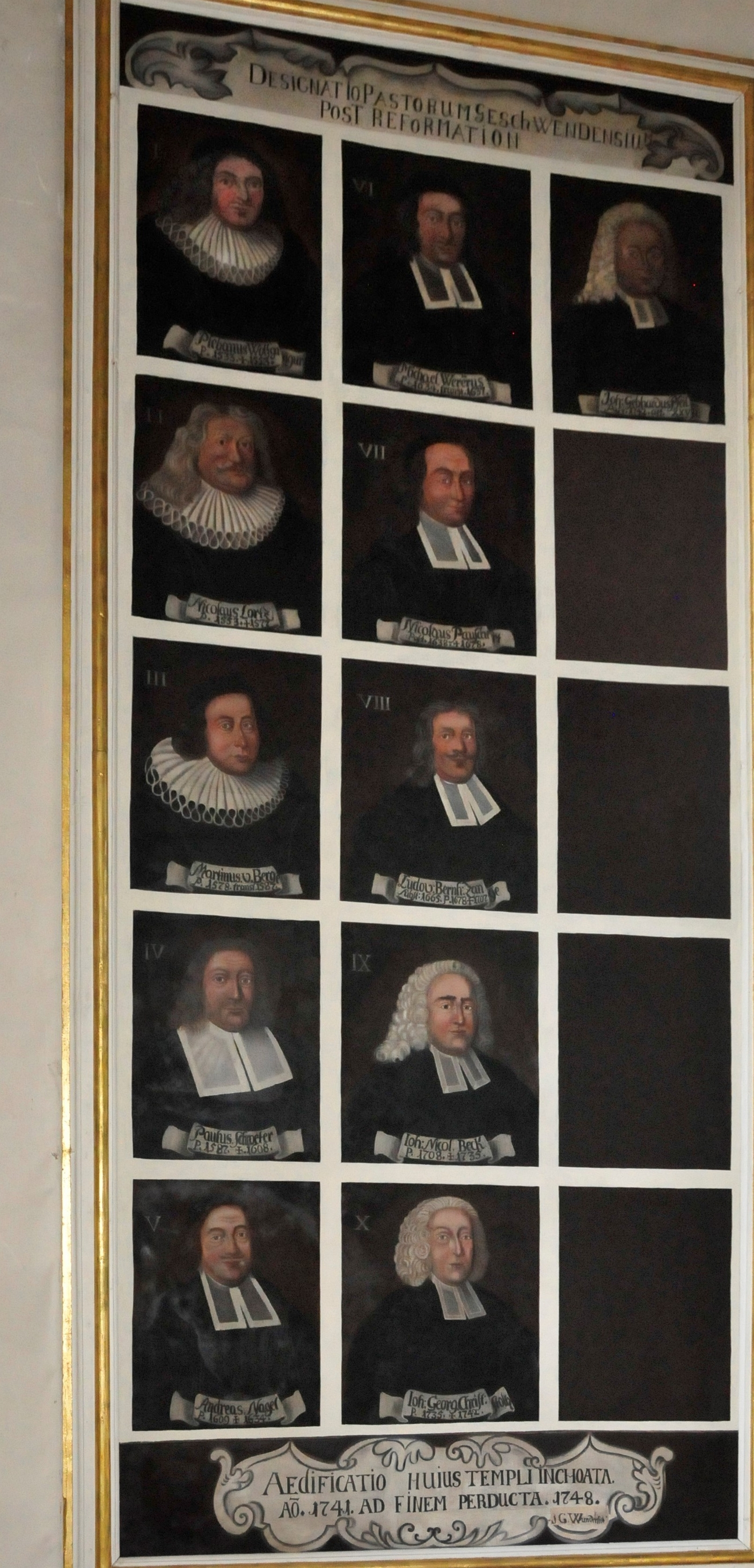 Tafel der nachreformatorischen Pfarrer der Nikolaikirche in Geschwenda, Ilm-Kreis, Thüringen